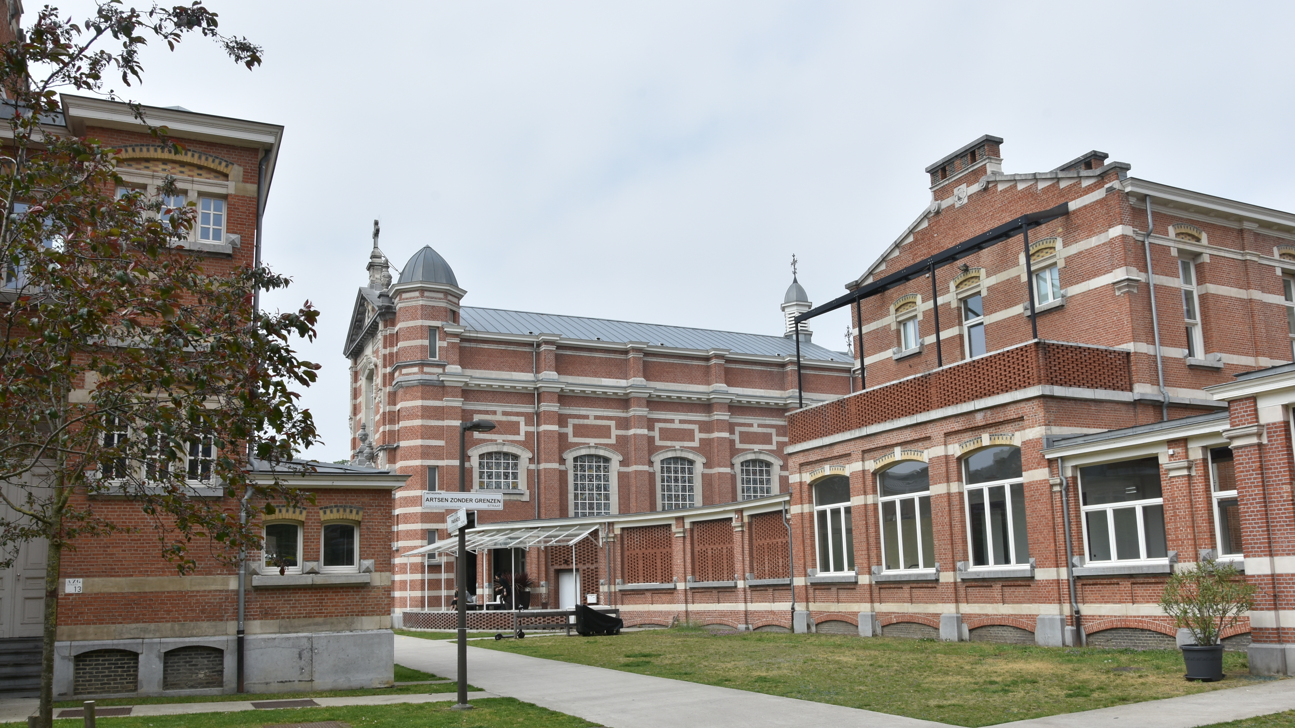 Kapel en paviljoen 5 Voormalig Militair Hospitaal en Arsenaal Antwerpen 1-05-2019